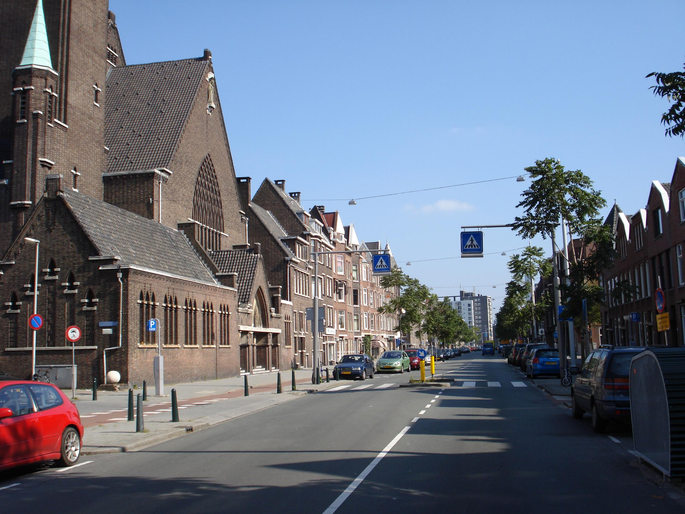 Beukelsdijk, straat in Rotterdam.